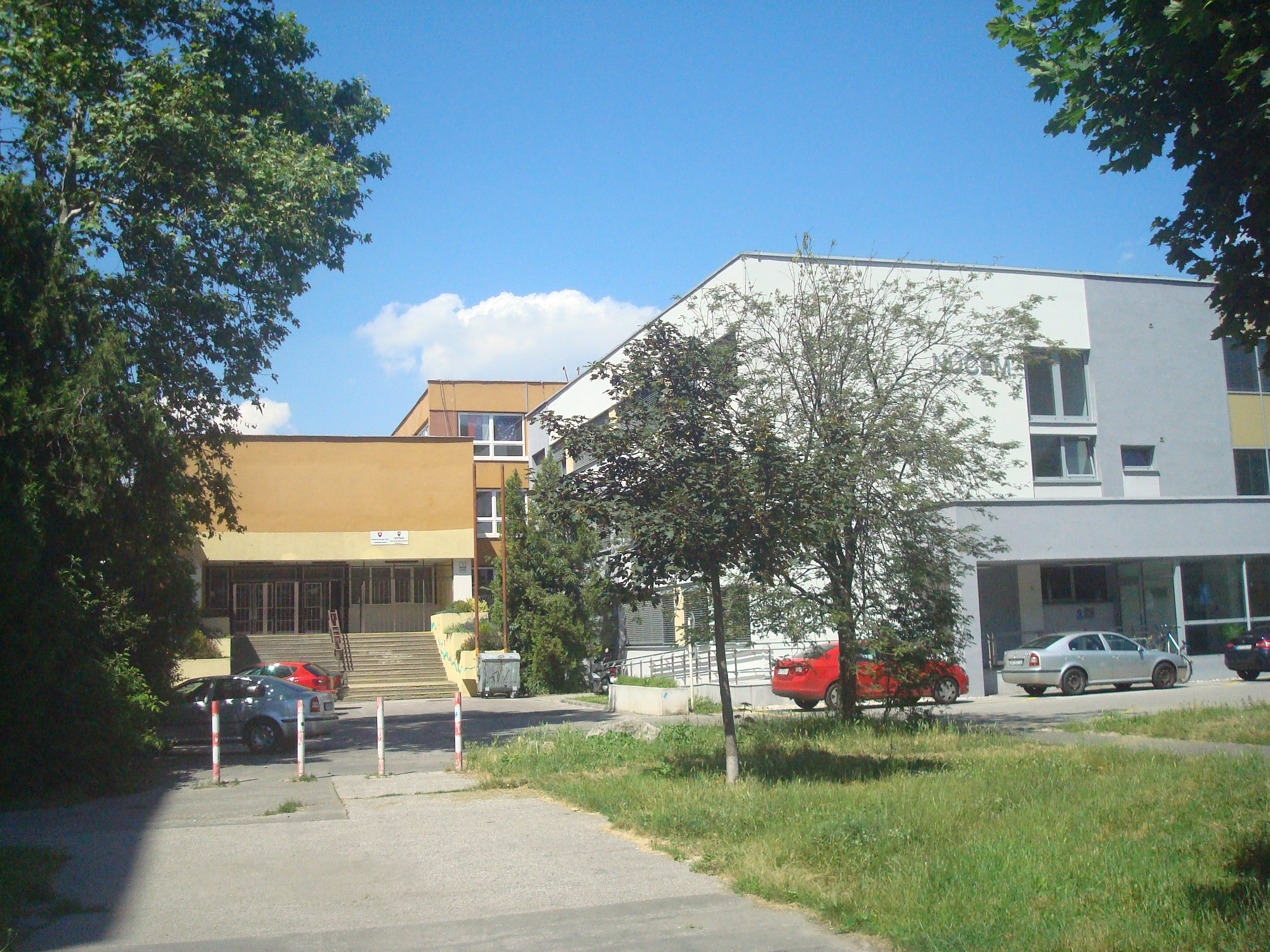 Special Elementary school Žehrianska street, Petržalka, Bratislava, Slovakia